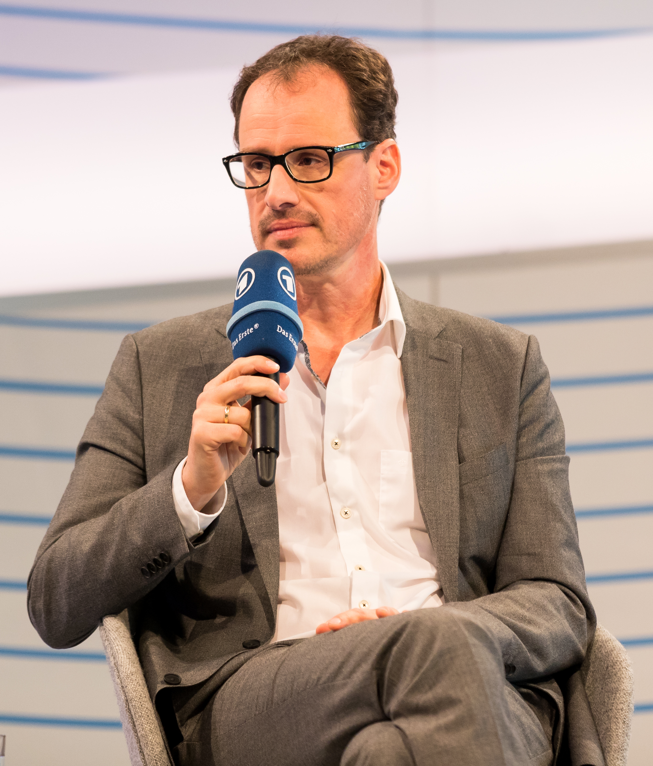 Dietrich Faber during Buchmesse at Messegelände, Frankfurt, Hessen, Germany on 2017-10-14, Photo: Sven Mandel